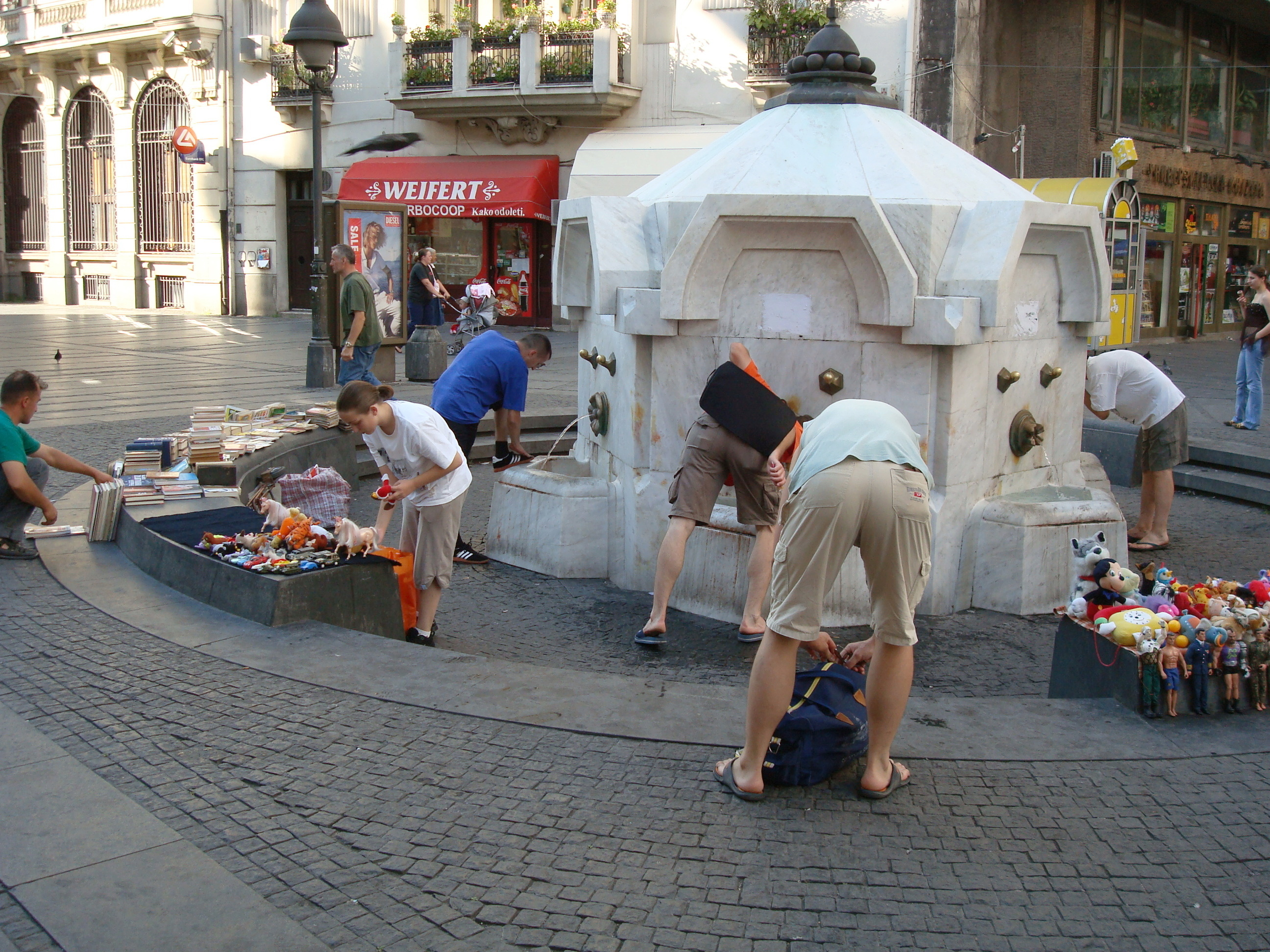 Delijska česma.